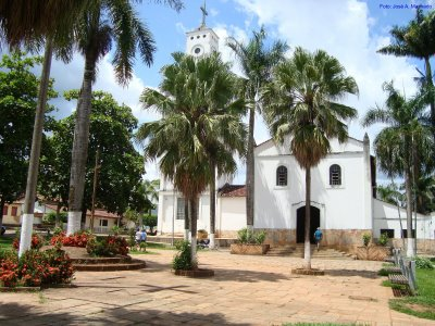 Praça da Matriz. Niquelândia, Brasil